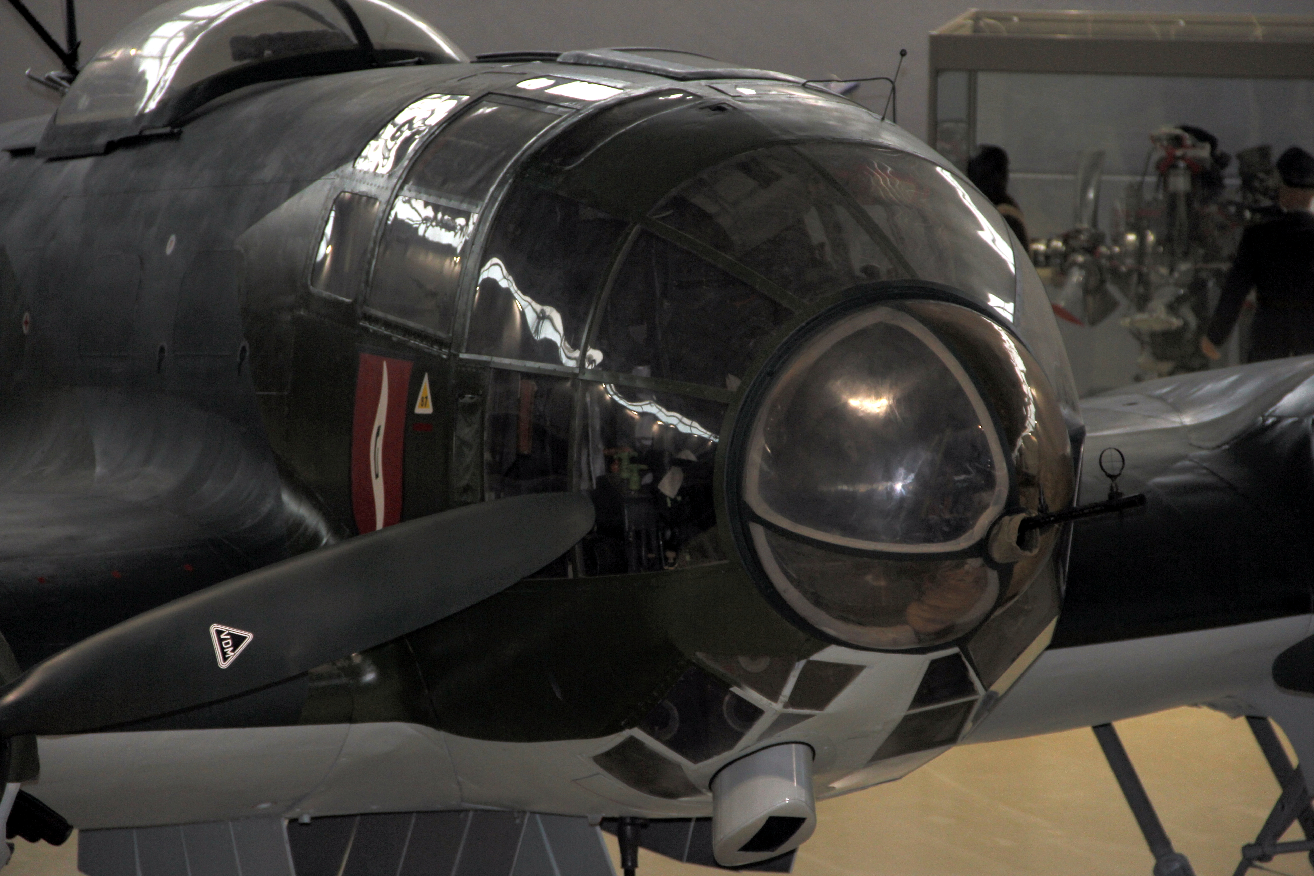 Heinkel He 111 P-2 (Wk Nr 1526)